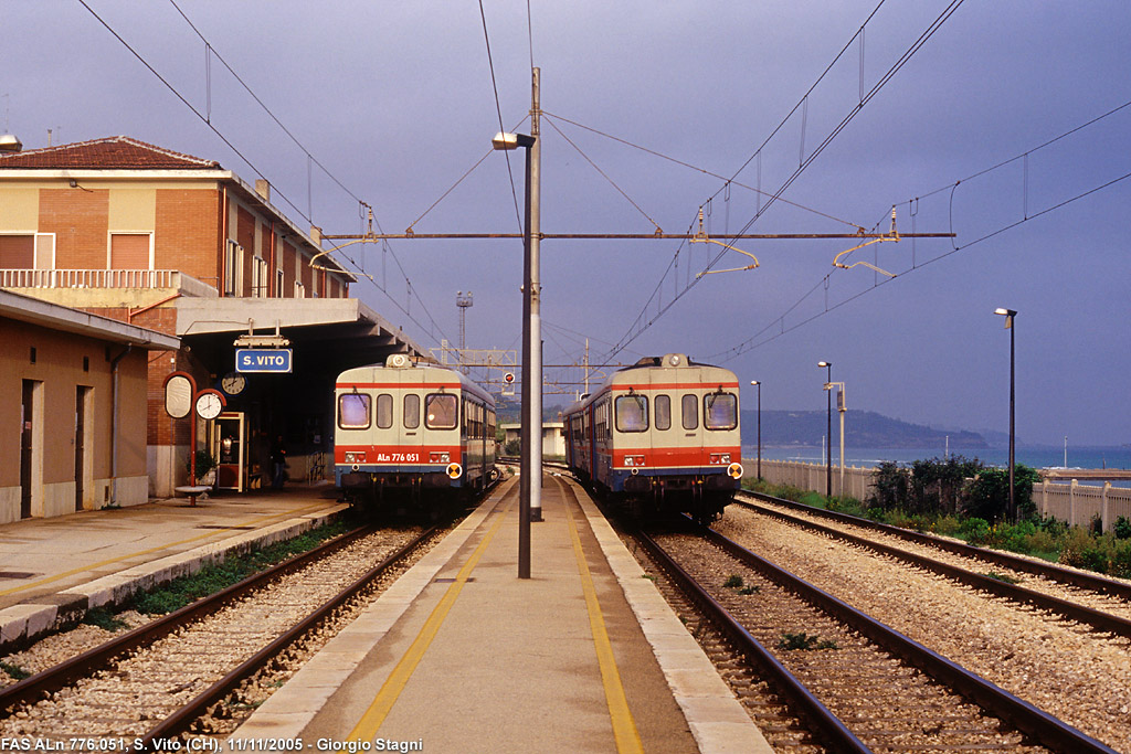 La vecchia stazione di San Vito-Lanciano sul tracciato costiero della ferrovia Adriatica. Incrocio fra automotrici ALn 776 della Ferrovia Sangritana.